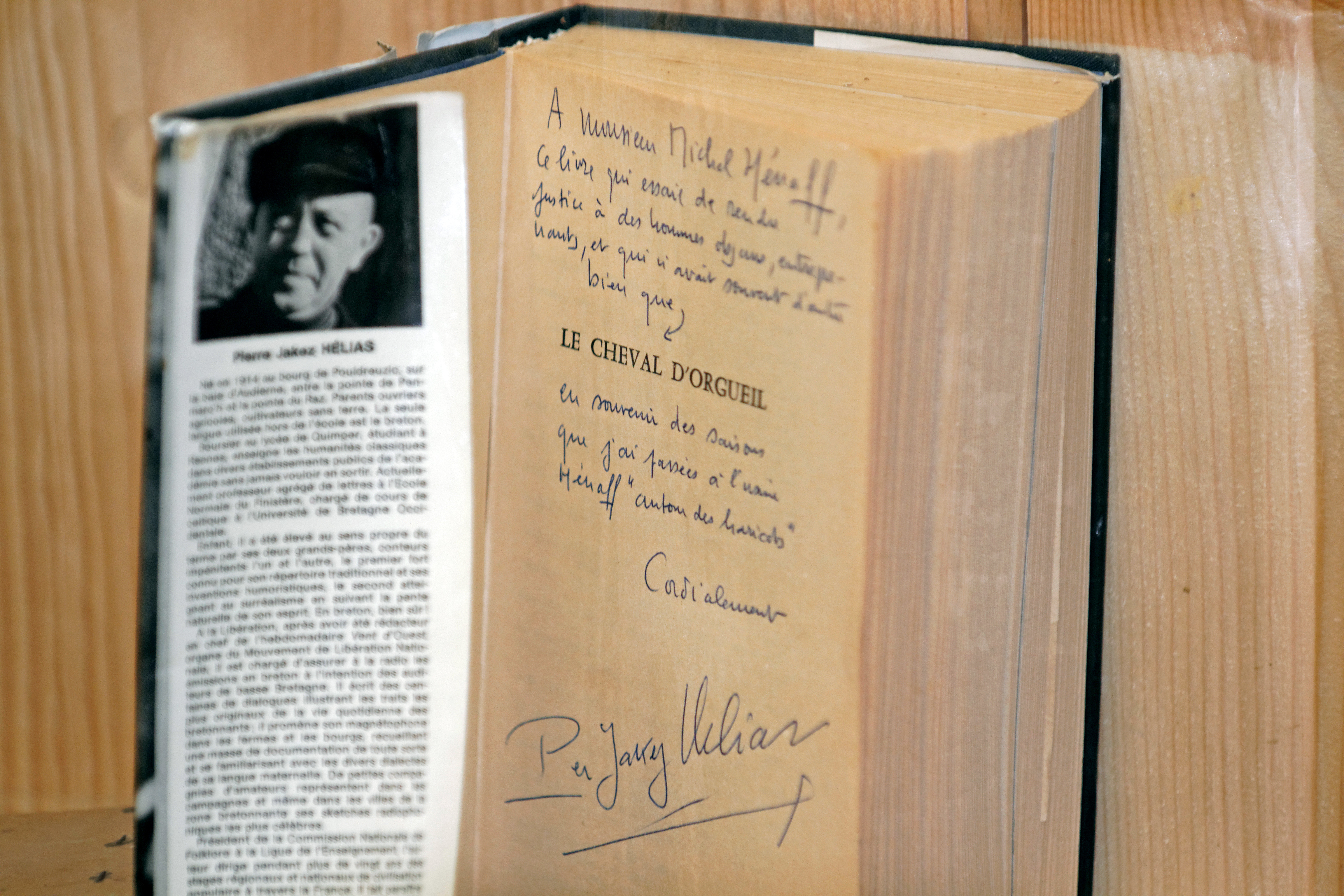 Exposition sur l'histoire du Pâté Hénaff dans le musée de la marque à Pouldreuzic.